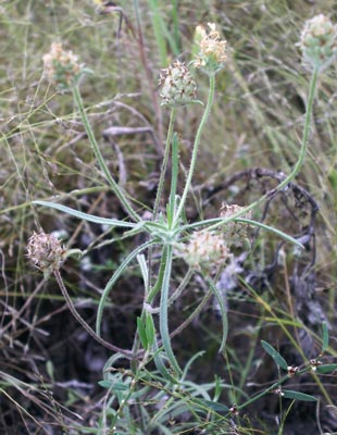 Plantago scabra Angers, France Source : [1]